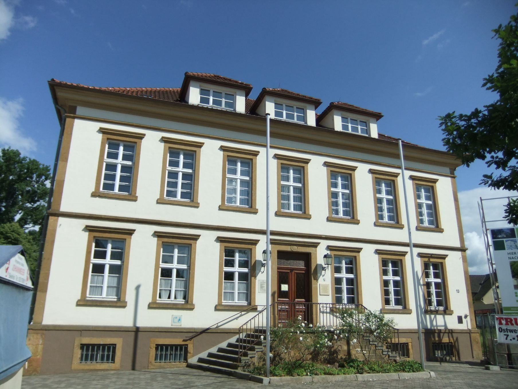 Altes Amtshaus Heepen im Juni 2014. Heute Bezirksamt für den Stadtbezirk.